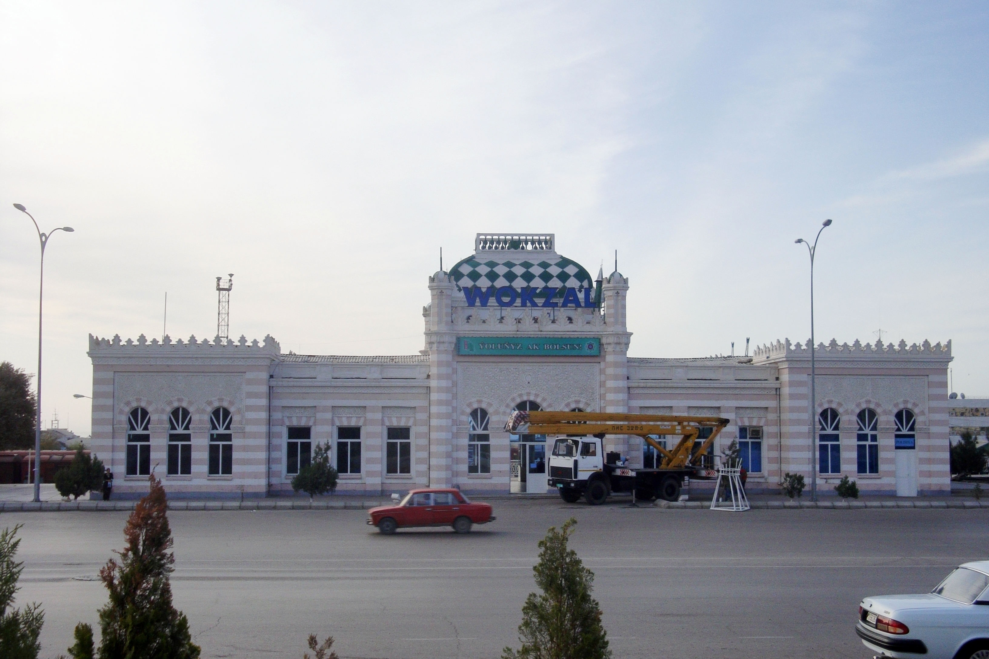 Железнодорожный вокзал города Туркменбаши